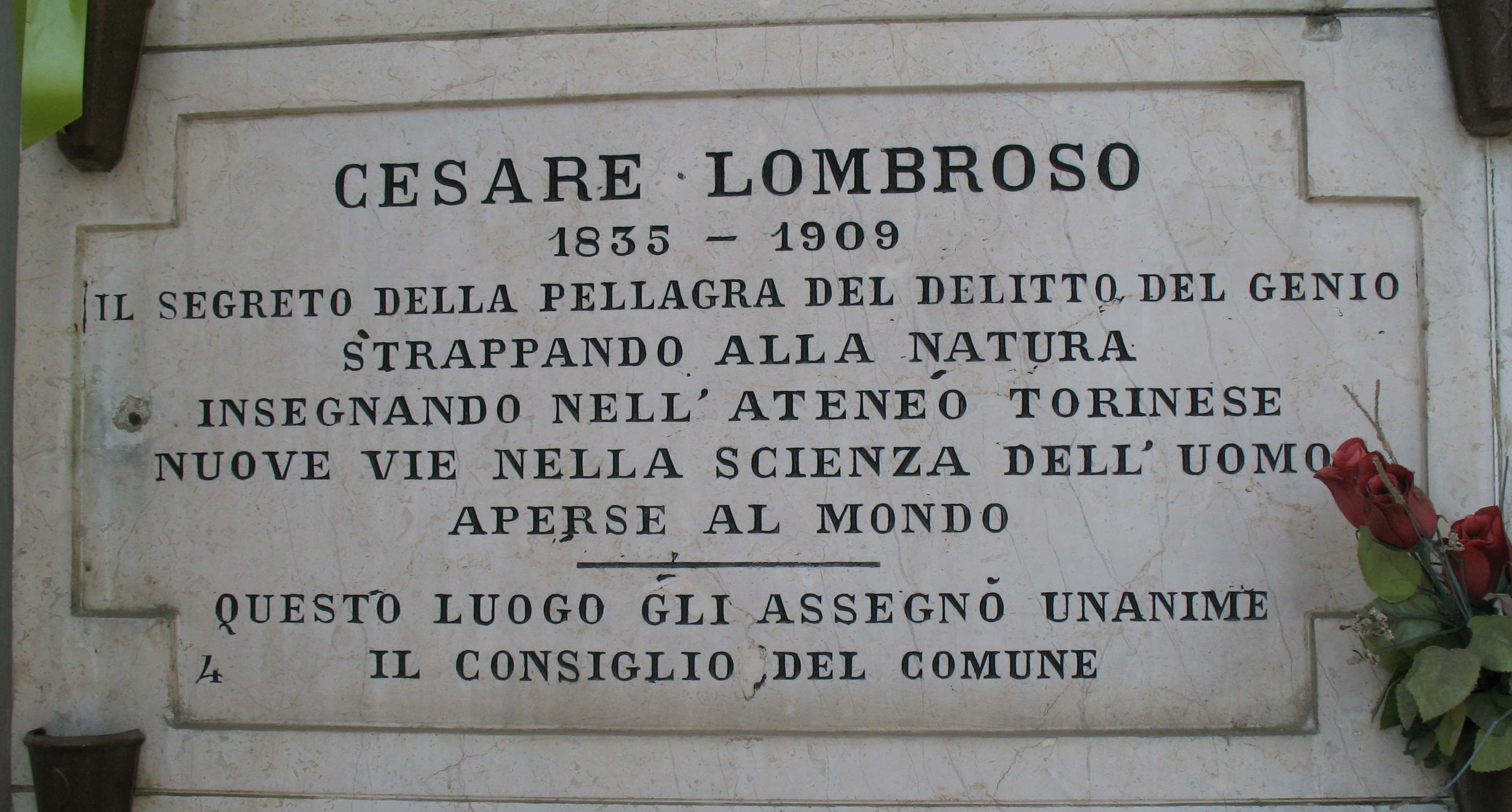 Cimitero monumentale di Torino, ampliazione 3, arcata 56, loculo di Cesare Lombroso.